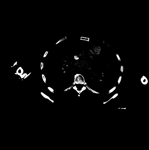 OSEAS